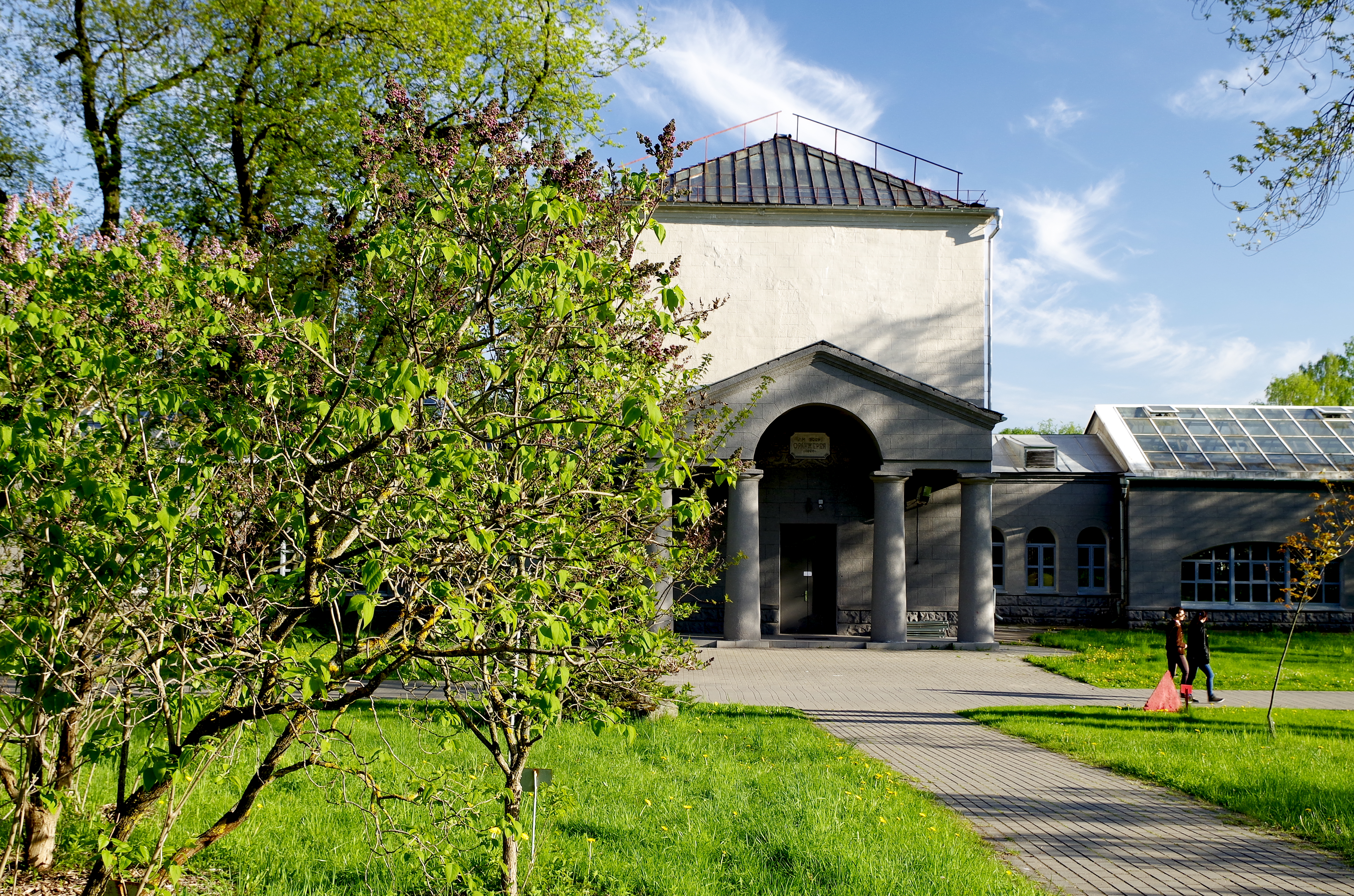 Ботанический сад, Минск. Здание